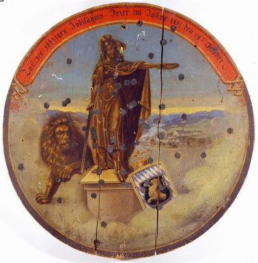 Schützenscheibe mit Allegorie der Bavaria mit Schwert, Kranz und Löwe, davor Wappen von Bad Tölz (?). Inschrift: Zur 200jährigen Jubiläums-Feier 1851 den 19. October. Bad Tölz, K. P. Feuerschützengesellschaft.